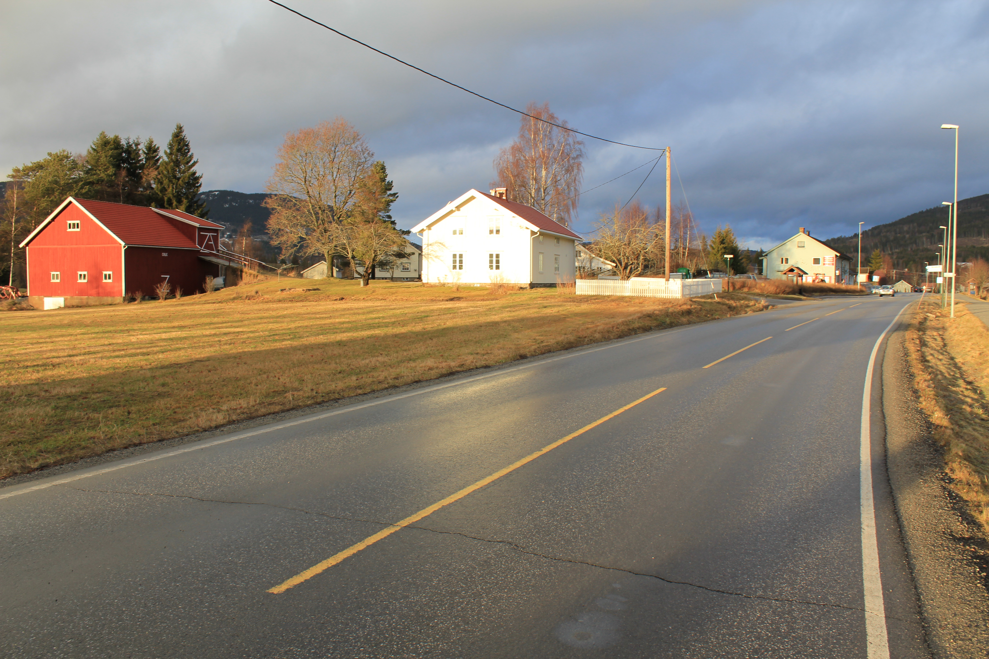 Hurdal er Akershus minste kommune i folketall, men den største i areal. Den spredte bebyggelsen, sentraliseringen av handels- og kommunefunksjoner, og det at mange arbeider og handler i nabokommunene, gjør trafikken etter hovedveiene meget intens i perioder.